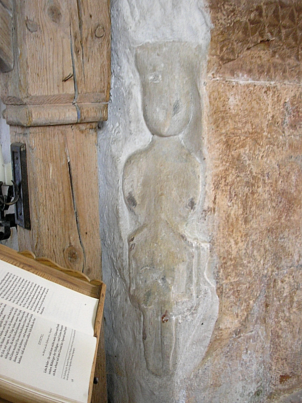 Obermerzbach bei Ebern (Landkreis Haßberge, Unterfranken). Filialkirche St. Michael. Romanische Skulptur am Chorbogen. Eigene Aufnahme, Juni 2006 / Obermerzbach near Ebern, (Lower Franconia, Germany). Church St. Michael. Romanesque sculpture at the entrance to the choir. Own photo, June 2006